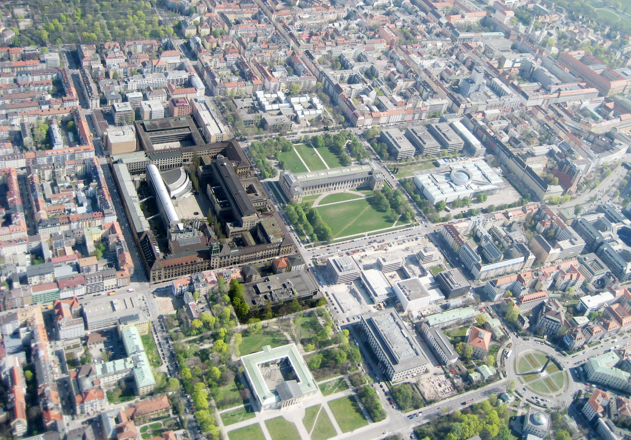 Luftbild des Stammgeländes der TU München in der Maxvorstadt